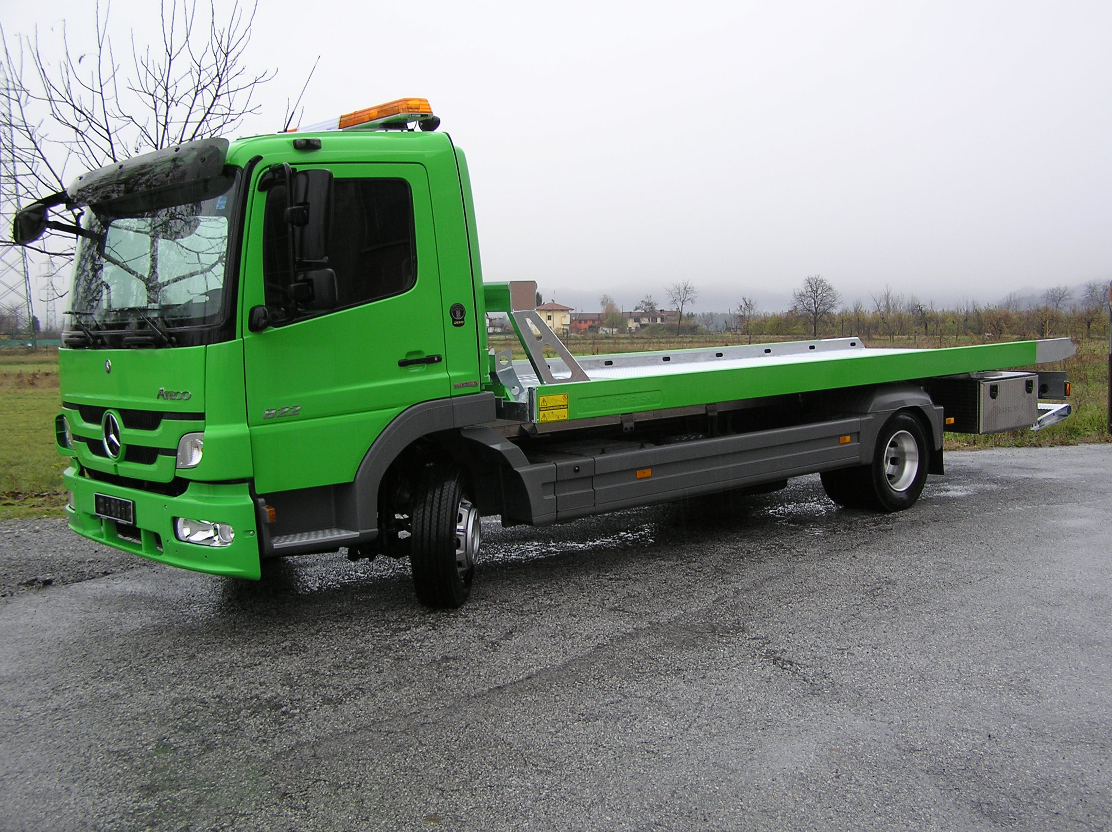 ATEGO Abschleppdienst mit Ausrüstung Andreis 2000 T3, 5 in Aktion in Sibirien